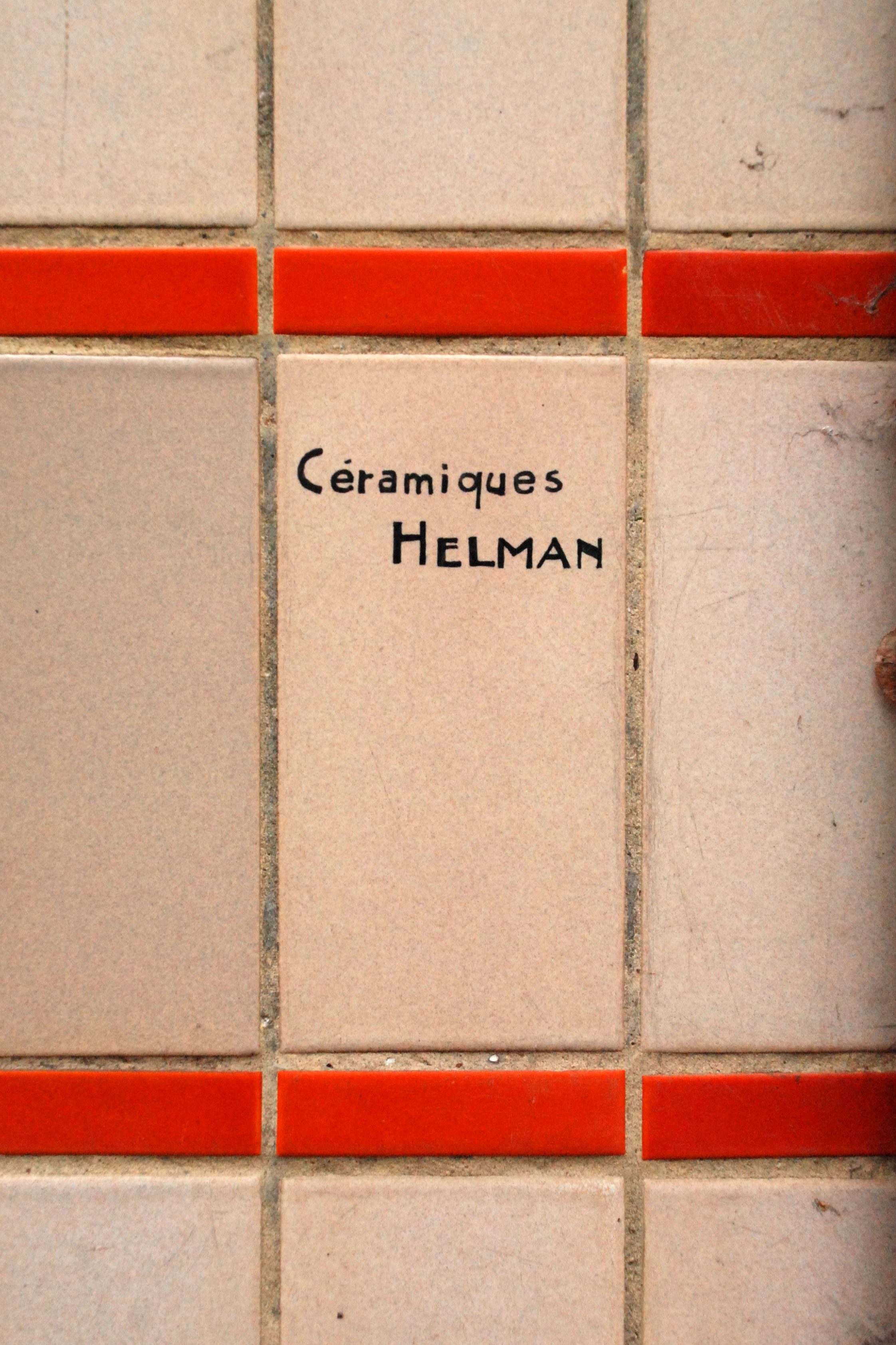 Belgique - Bruxelles - Berchem-Sainte-Agathe - Rue de l'Eglise 58 - Modernisme - Ateliers Helman